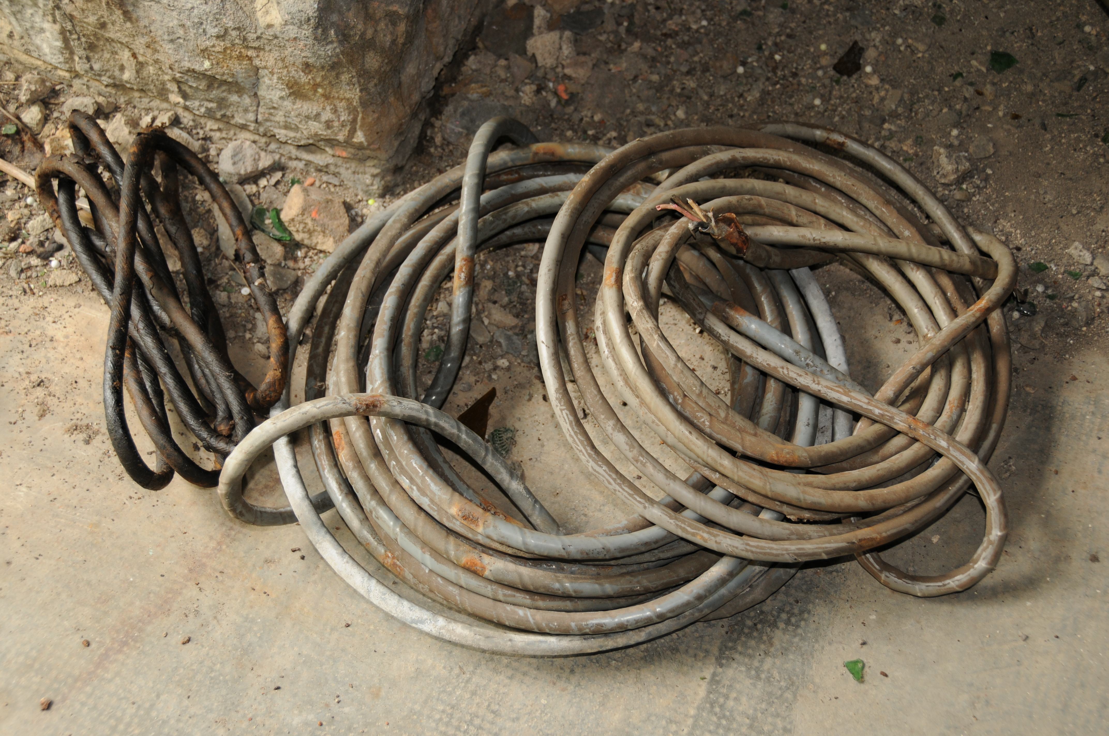 Câbles électriques permettant d'éclairer, à l'origine, le couloir de l'entrée Ouest. Ils sont enroulés ainsi par des récupérateurs clandestins. Salbert hill fortifications.